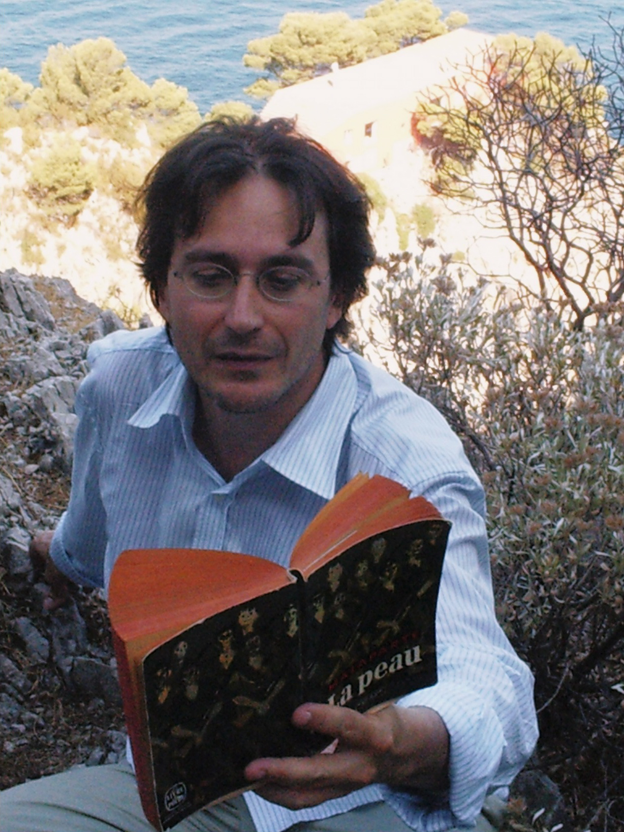 L'écrivain Marc-Edouard Nabe.